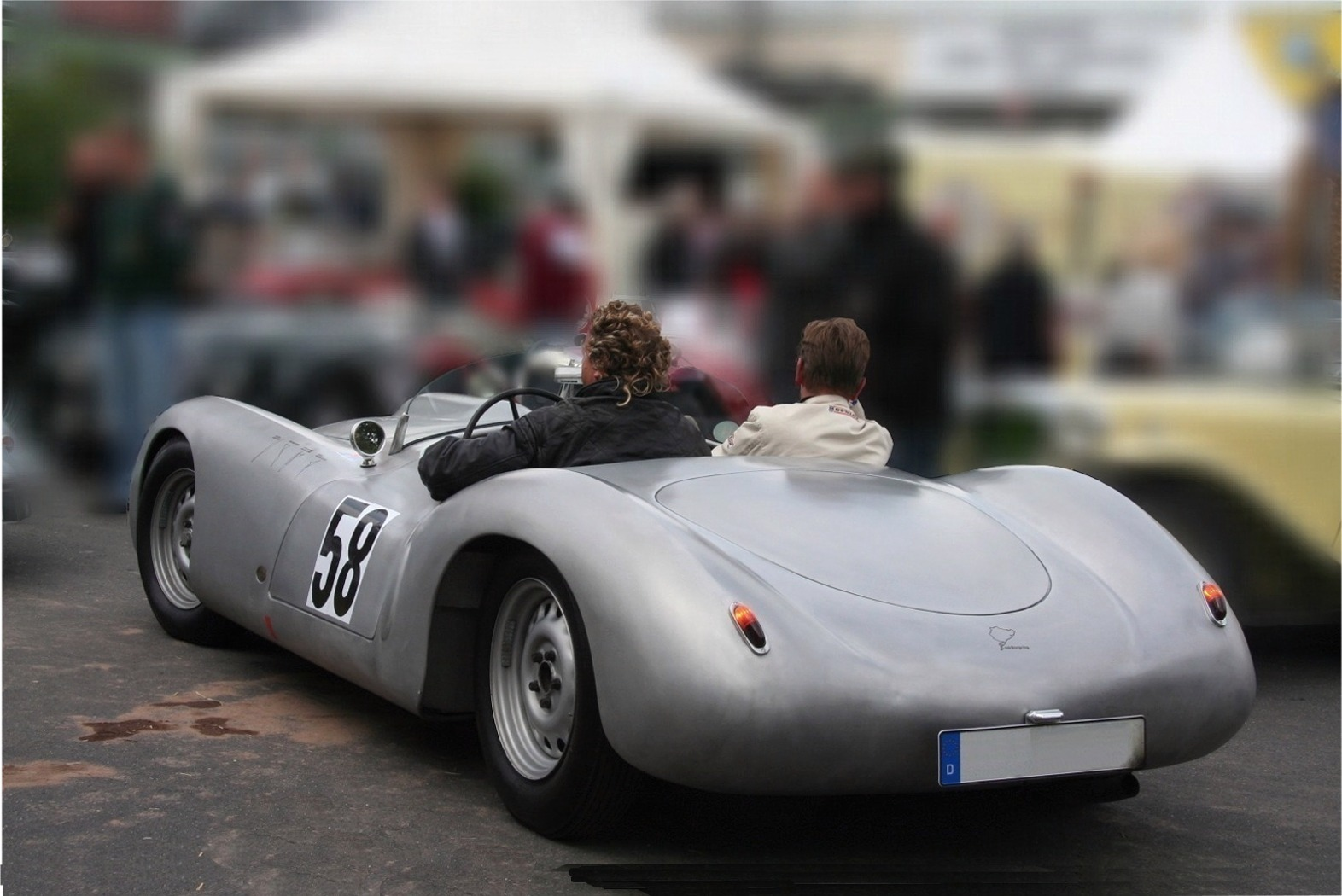 Großer Werkmeister, Rennsportwagen auf der Basis des BMW 328